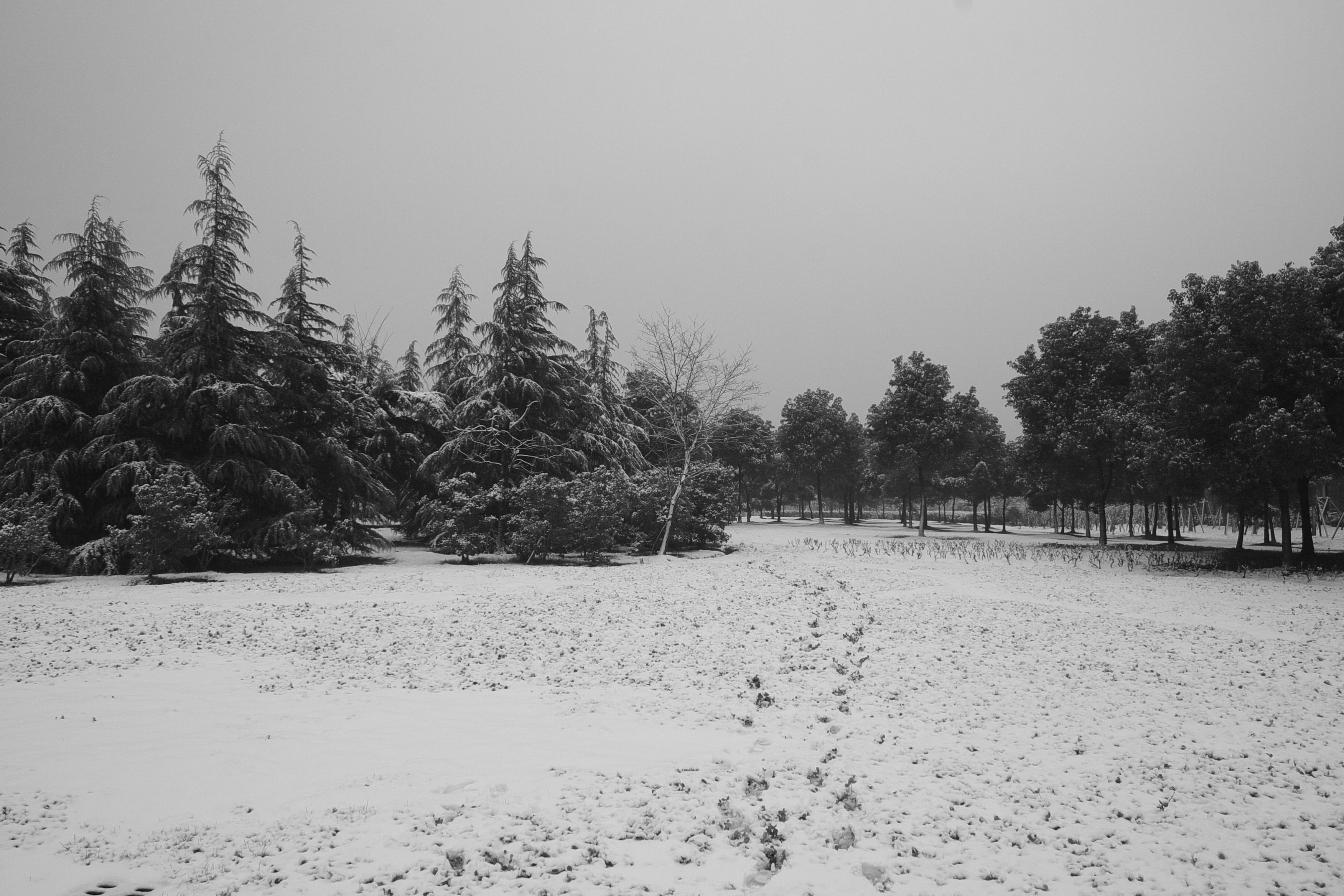 2008年1月上海下雪雪